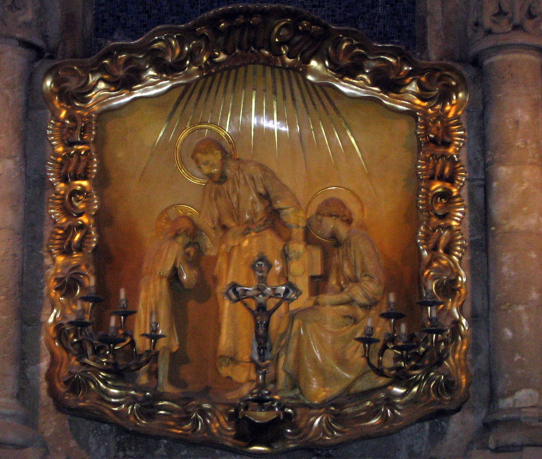 Sagrada Familia, de Josep Llimona, cripta de la Sagrada Familia. Este oratorio fue creado para la casa Batlló de Barcelona